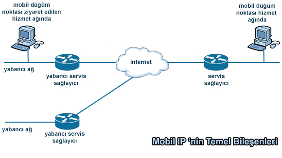 Mobil IP 'nin Temel Bileşenleri